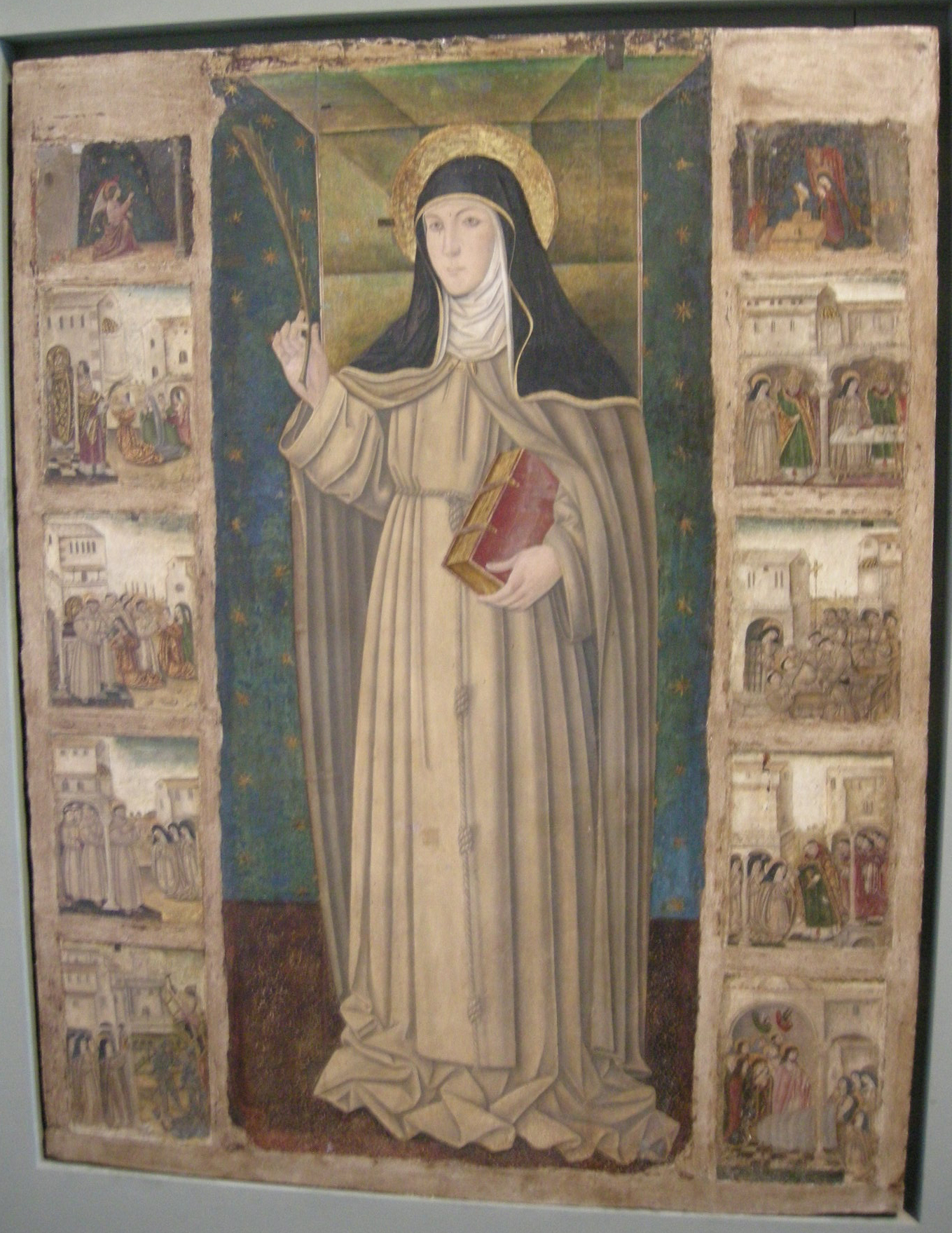 Museo regionale di messina, giovannello da italia, santa chiara, storie della sua vita e annunciazion